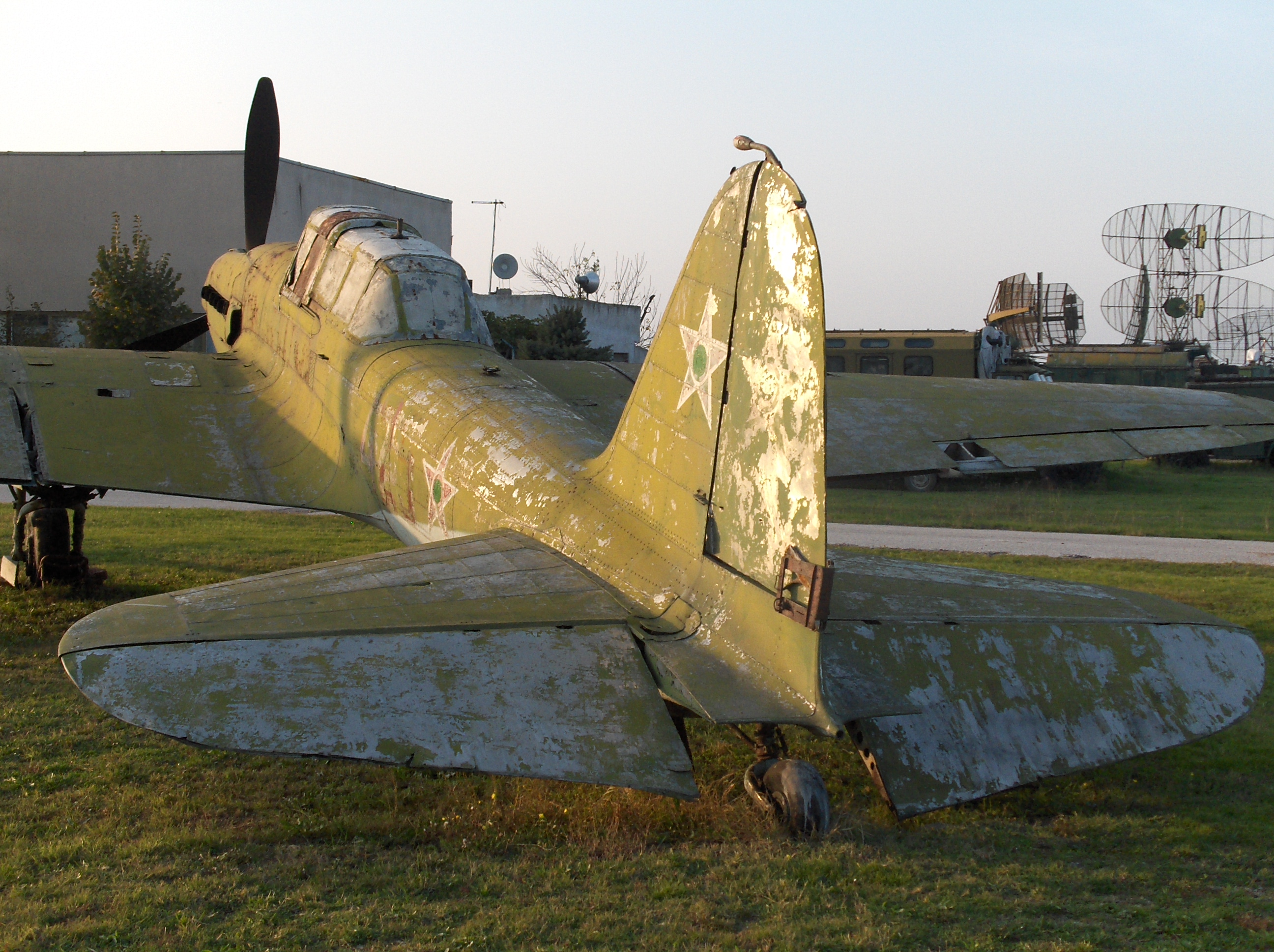 Ilyushin Il-2